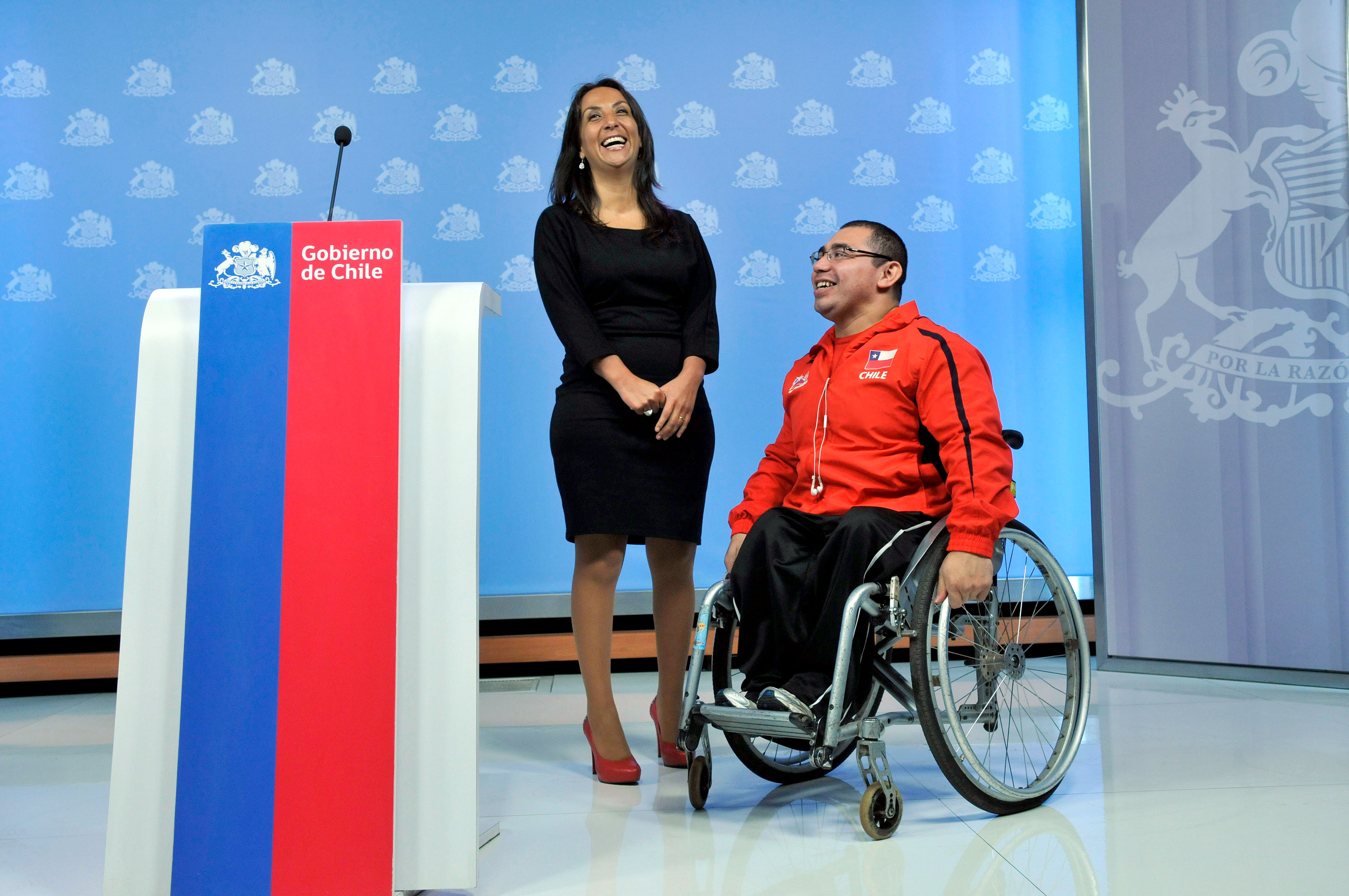 reunión Ministra Cecilia Pérez y Subsecretario Gabriel Ruiz-Tagle con deportistas para analizar el estado de avance del proyecto de ley que crea el Ministerio del Deporte